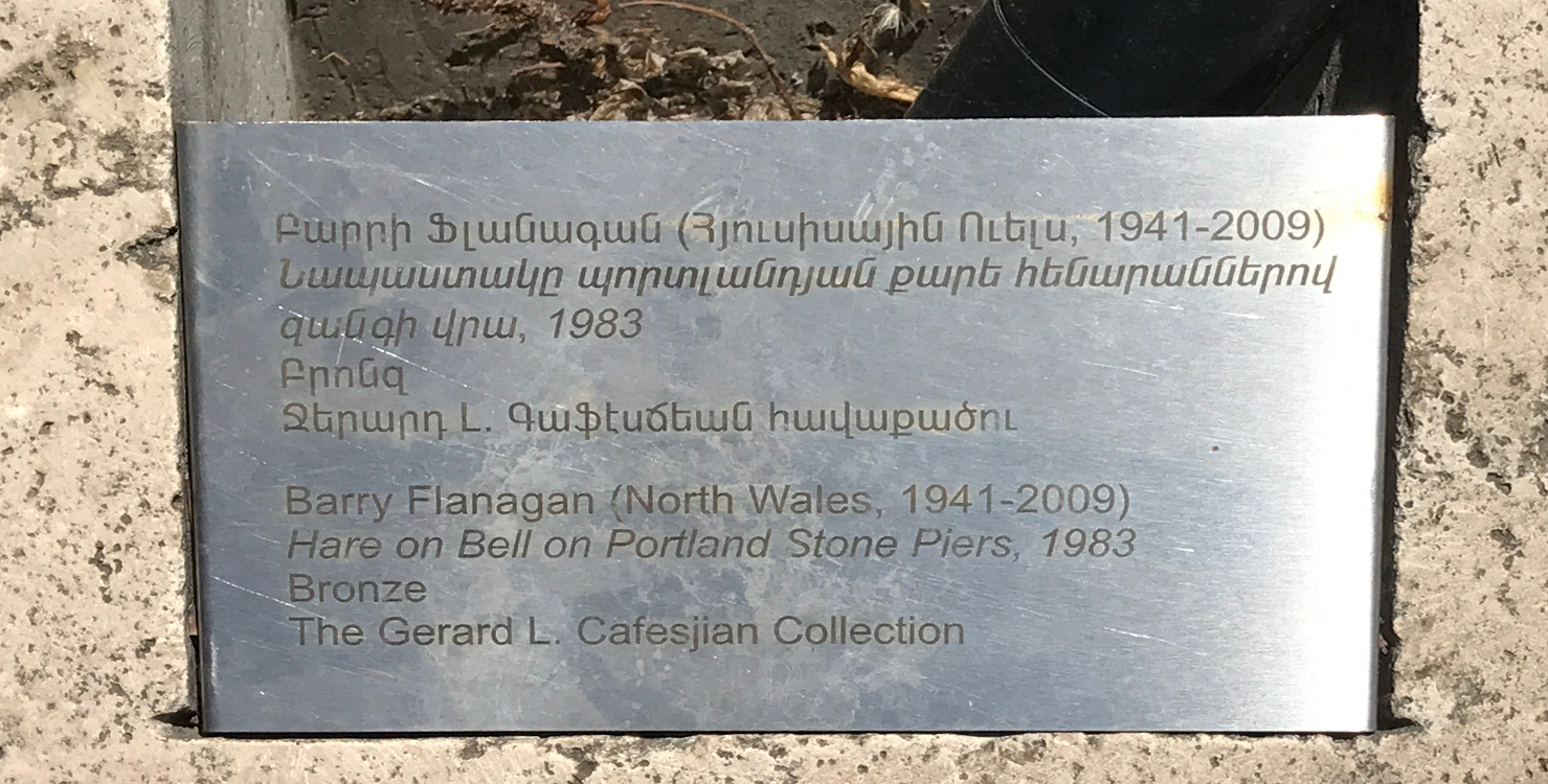 Art public, rue Tamanian, Erevan, 2017.